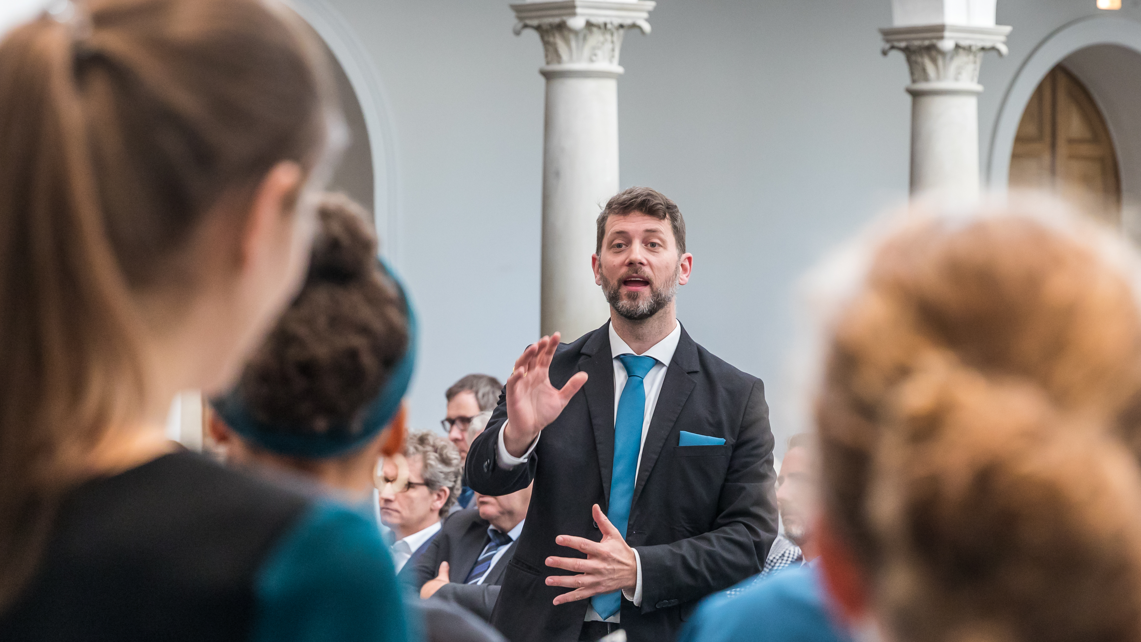 Ausstellungseröffnung „ParallelUNIversum?! Köln und seine Universität seit 1919“ des Historischen Archivs der Stadt Köln. Eröffnungsort: Trinitatiskirche. Ausstellungsort: Heumarkt 14, Köln Foto: Musikalische Begleitung durch den Jazzchor der Universität zu Köln unter der Leitung des Dirigenten Dietrich Thomas